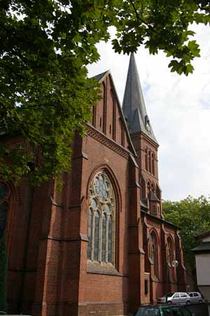 Katholic Church in Witten-Annen